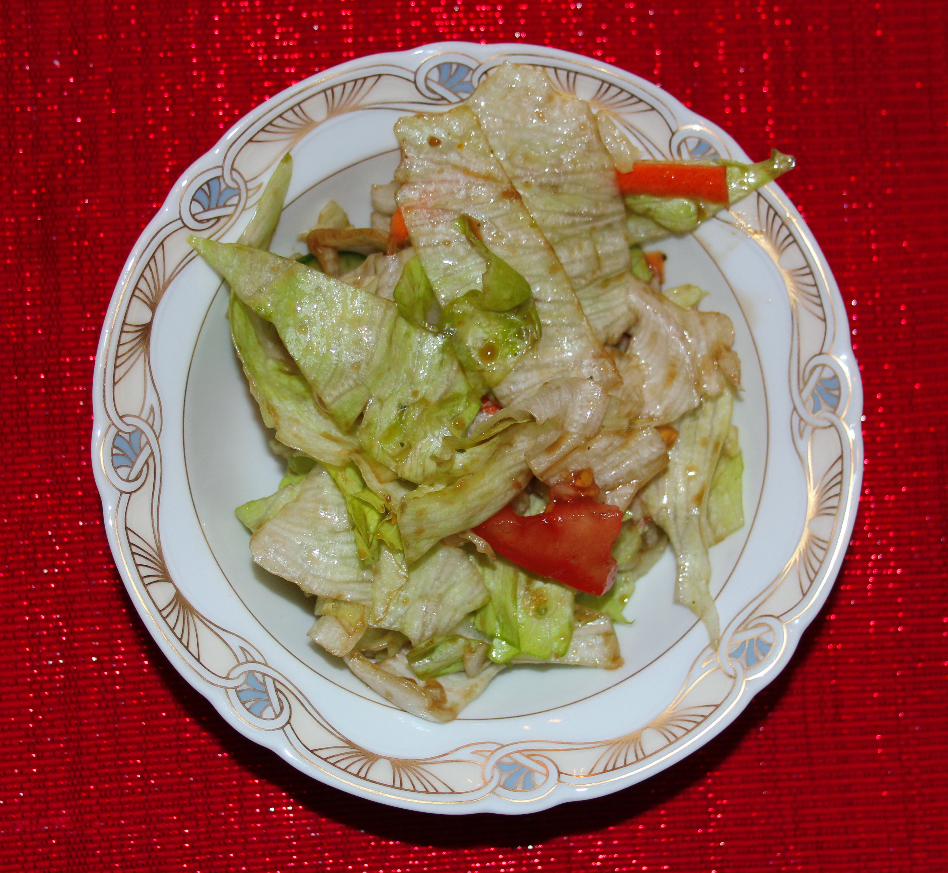 Eisbergsalat mit Tomaten in einer Porzellansaltaschüssel.